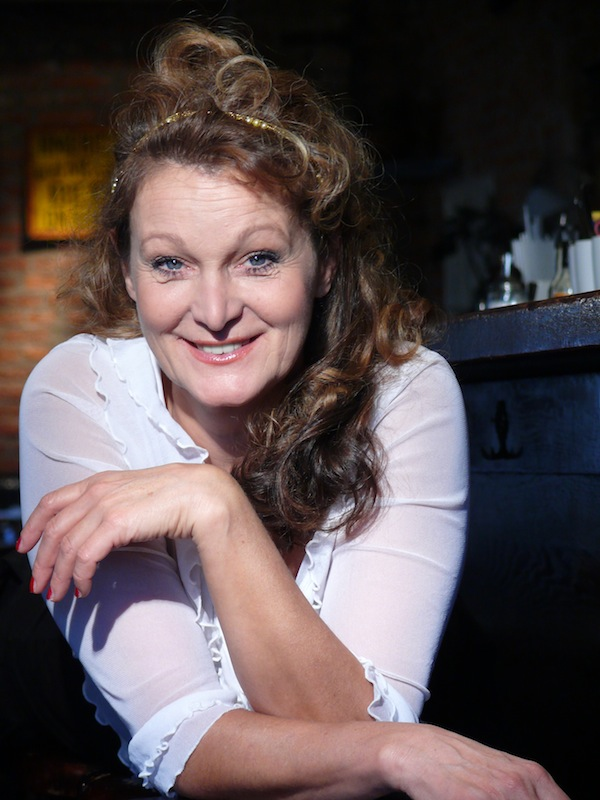 Portrait Barbara Weinzierl